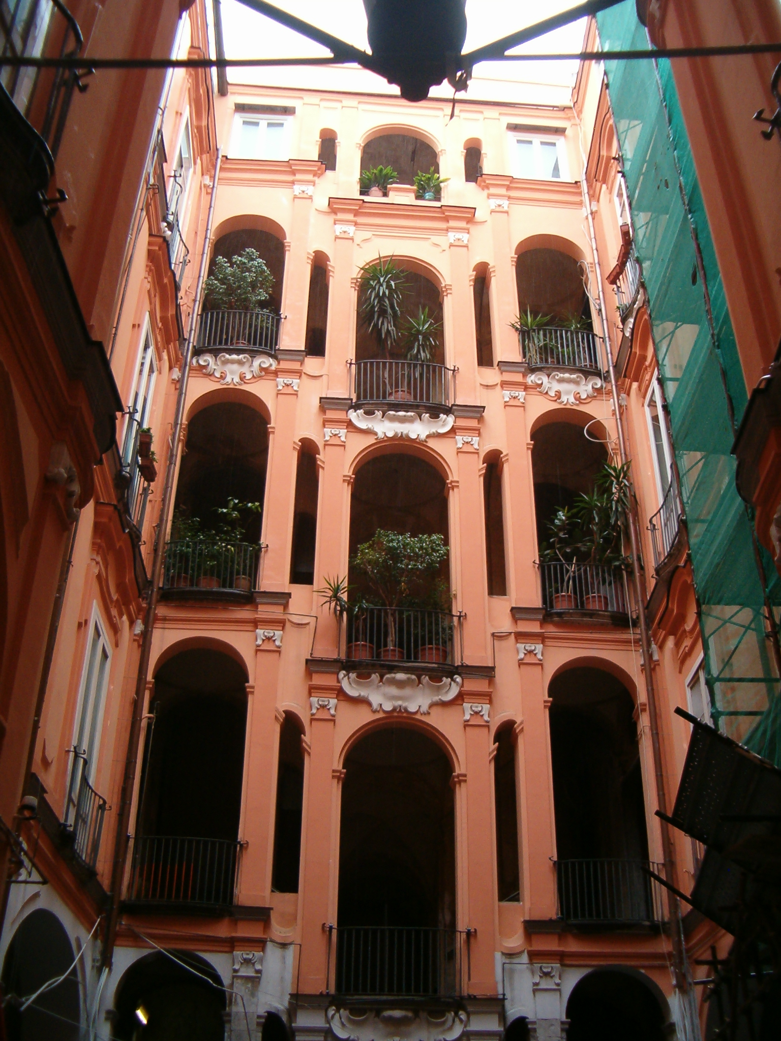 Napoli, via San Liborio 1. Palazzo Trabucco : palazzo rococò, con bel cortile con tipica scala napoletana che fa da quinta scenografica. È un esempio abbastanza raro di scala rococò dopo quelli numerosi di epoca barocca disseminati in tutta la città; qui la scala è caratterizzata da ben cinque archi affiancati e sfalsati per ciascun piano. I lavori di restauro del palazzo, durati a lungo, sono in via di completamento (novembre 2007).